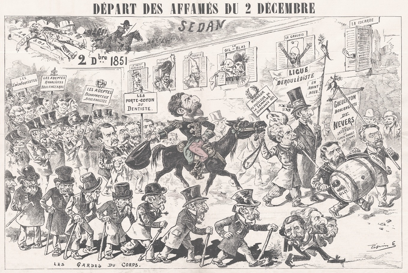 "Départ des affamés du 2 décembre".